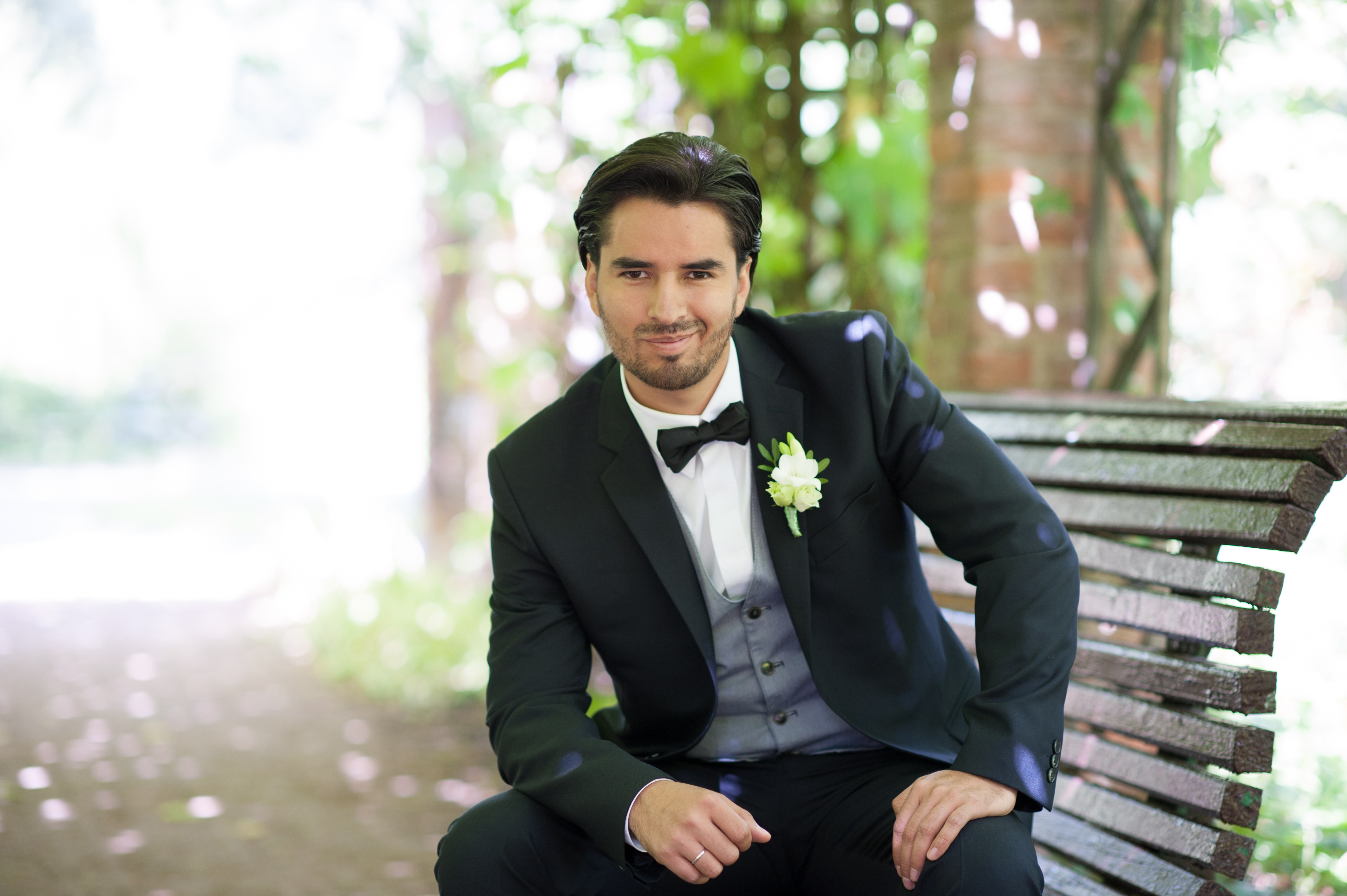 Erick Fonseca. Actor, viajero y presentador de TV